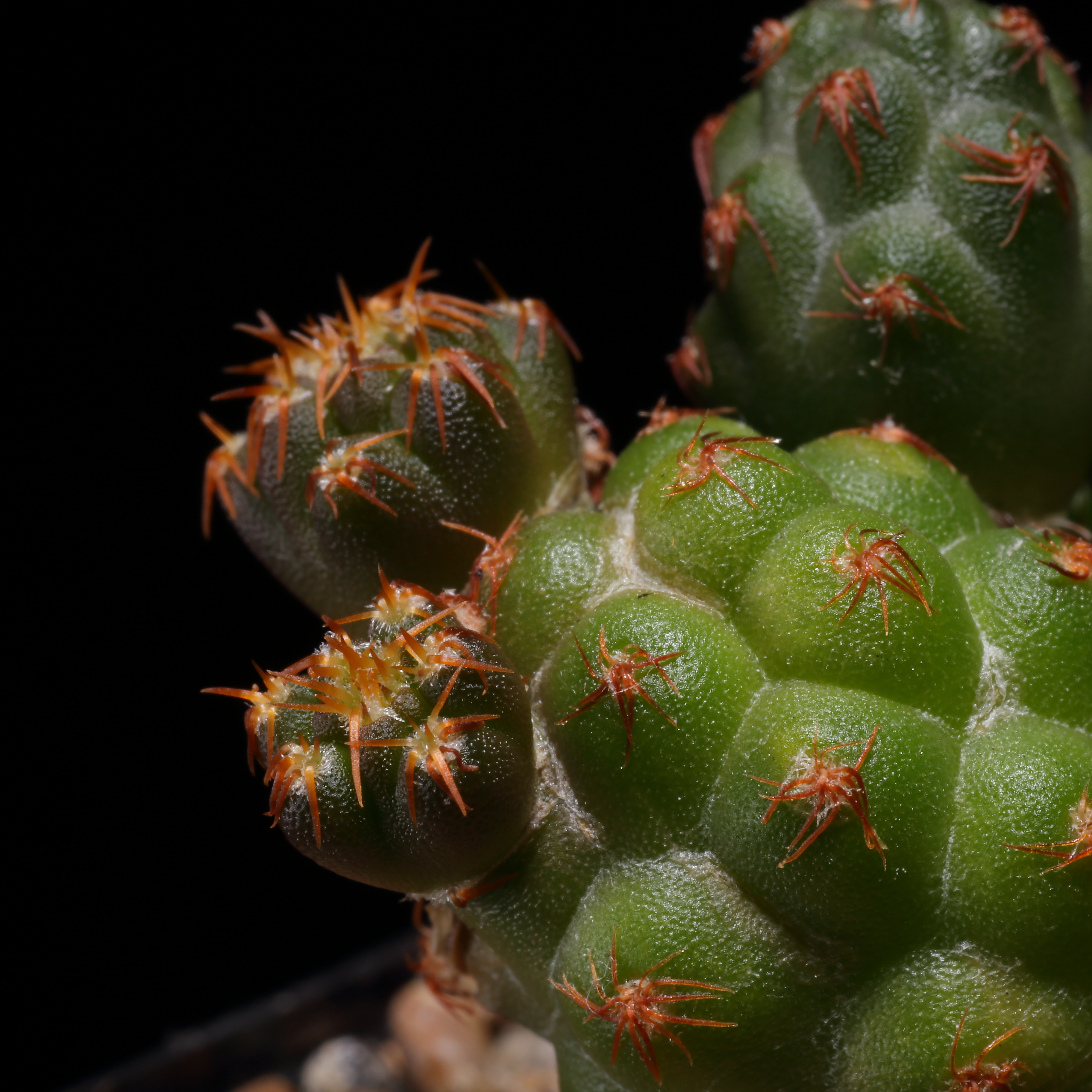 Två nya segment som utvecklas på en Tephrocactus bonnieae.